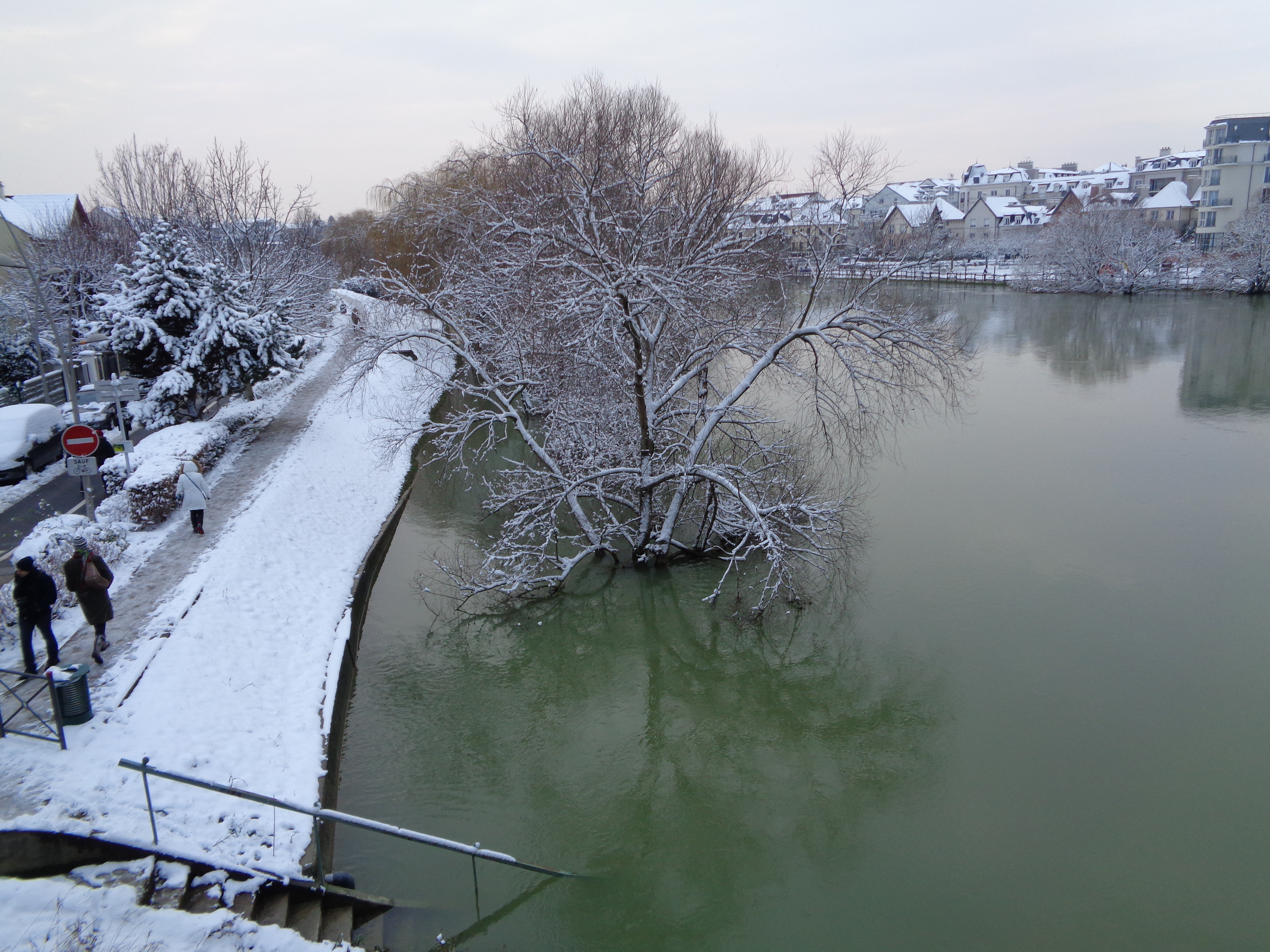 Photographie prise le 8 février 2018. A la gauche de l'image, Bry-sur-Marne. A la droite, Neuilly-Pleasance. Image prise durant la crue de la Marne, et alors que l'Île-de-France est sous la neige.